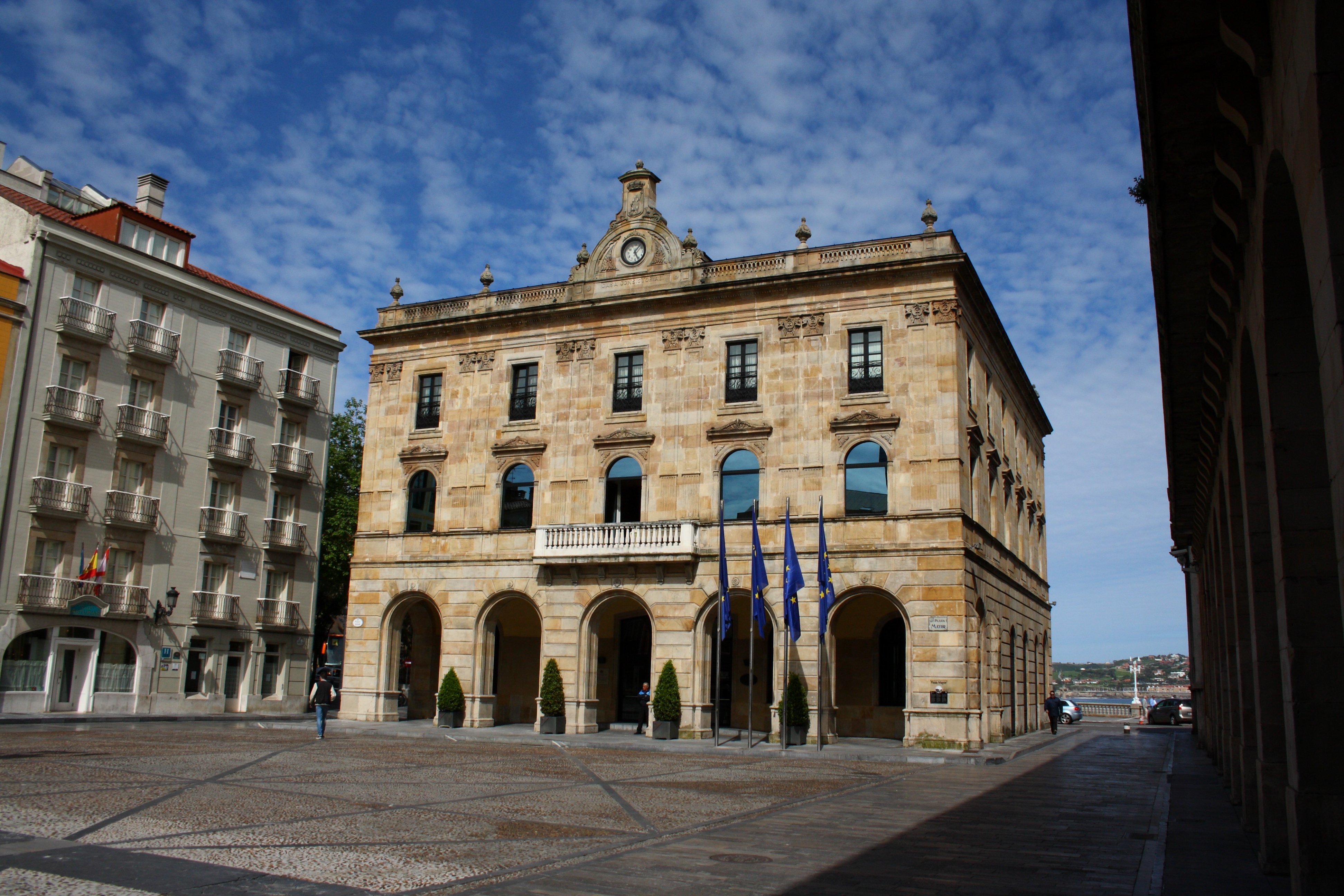 Ayuntamiento de Gijón